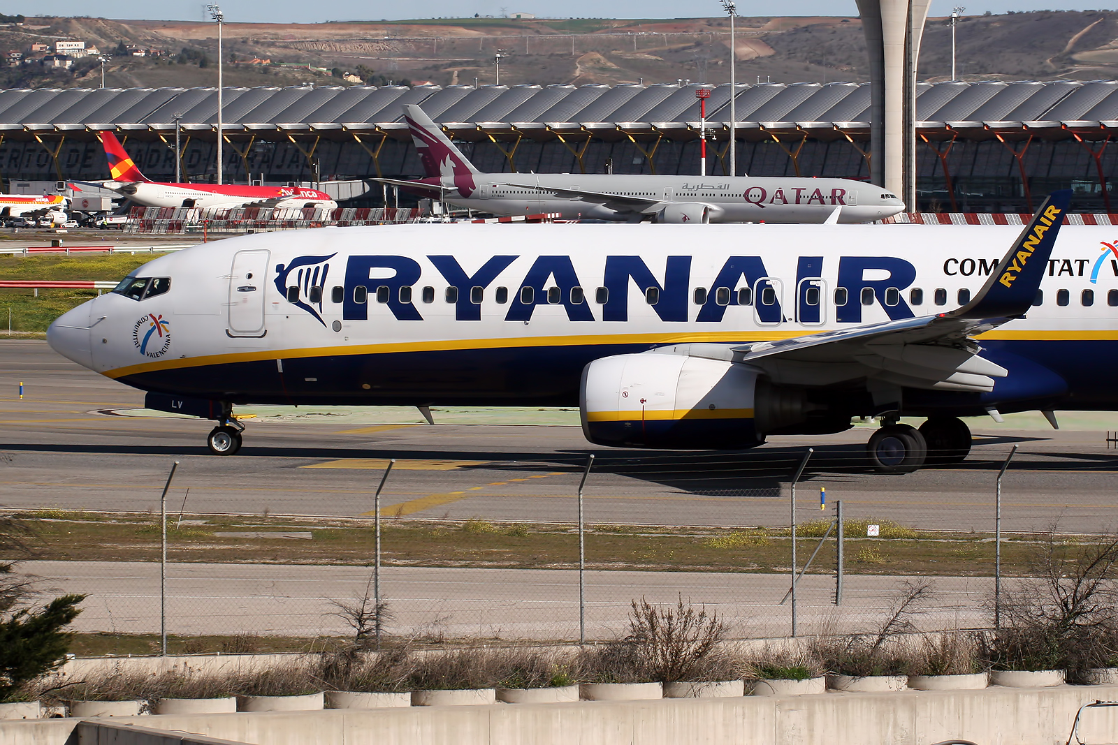 Madrid - Barajas Airport (LEMD/MAD)